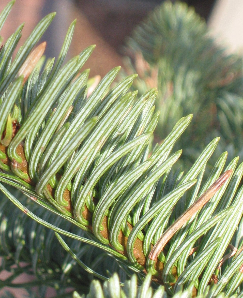 (Abies procera naalden)needles